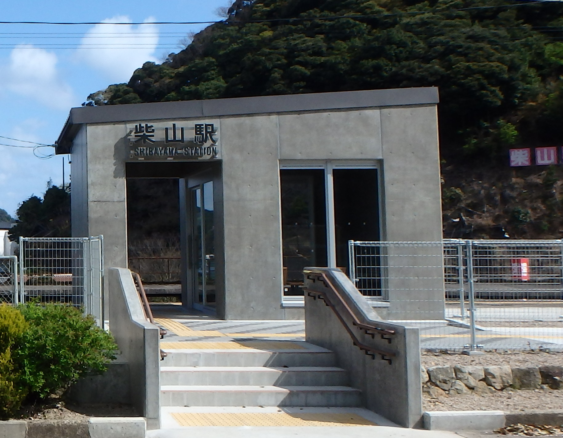 「柴山駅」の駅舎で、コンクリート製。時刻表・運賃表と待合室がにある。